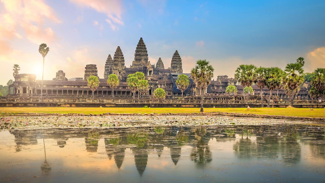 ភាសាខ្មែរ: ប្រាសាទអង្គរវត្តខ្មែរគឺជាទីក្រុង រាជធានីនៃប្រាសាទជាប្រាសាទព្រះវិហារមួយនៅក្នុងប្រទេសកម្ពុជានិងជាវិមានសាសនាធំជាងគេនៅលើពិភពលោក លើទីតាំងមួយដែលមានទំហំ ១៦២,៦ ហិកតា (១.៦២៦,០០០ ម ២; ៤០២ ហិចតា) ។ ដើមឡើយត្រូវបានសាងសង់ជាប្រាសាទហិណ្ឌូឧទ្ទិសដល់អាទិទេពព្រះវិស្ណុសម្រាប់ចក្រភពខ្មែរវាត្រូវបានប្រែក្លាយបន្តិចម្ដងៗទៅជាប្រាសាទព្រះពុទ្ធសាសនាឆ្ពោះទៅចុងសតវត្សរ៍ទី ១២ ។